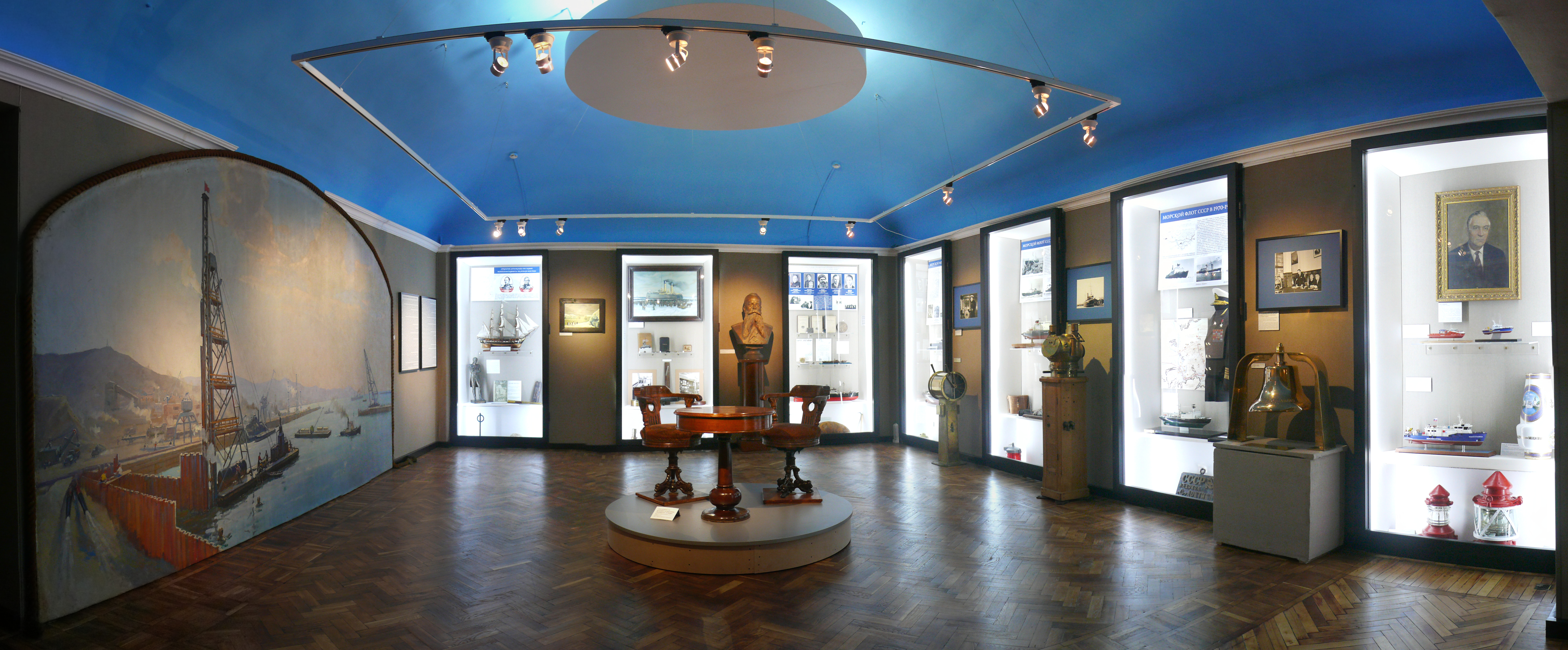 Экспозиция действующей стационарной выставки Музея морского флота. В центре зала стол и два кресла из кают-компании ледокола «Ермак». Музей морского флота, Москва, Большая Ордынка, д. 19, строение 1.